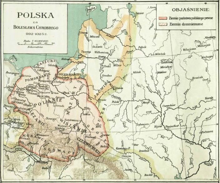 Państwo Bolesława Chrobrego w "Polska w 10 ważniejszych okresach historycznych" Fr. Karpowicza z 1935 roku.